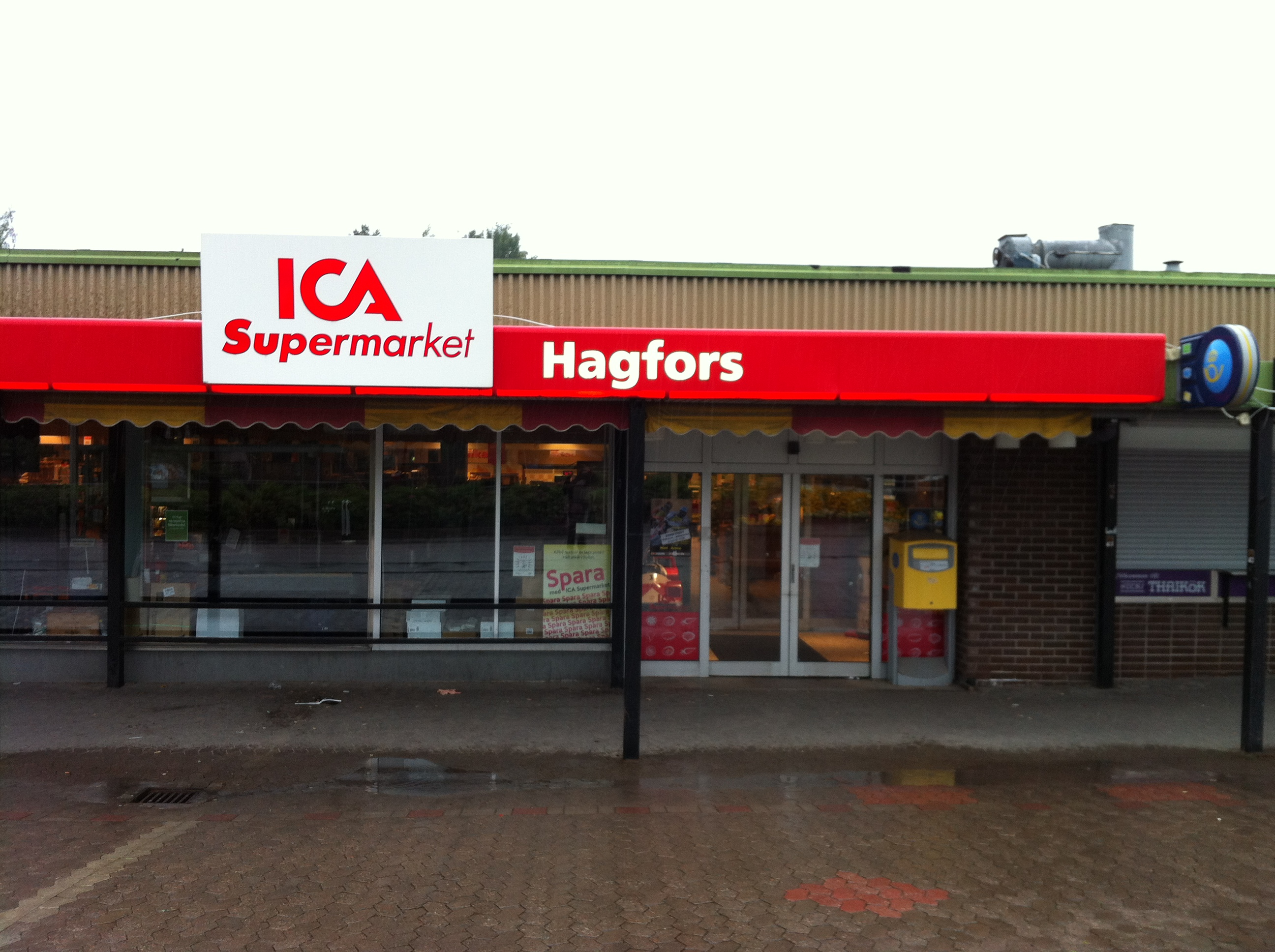 ICA Supermarket Hagfors